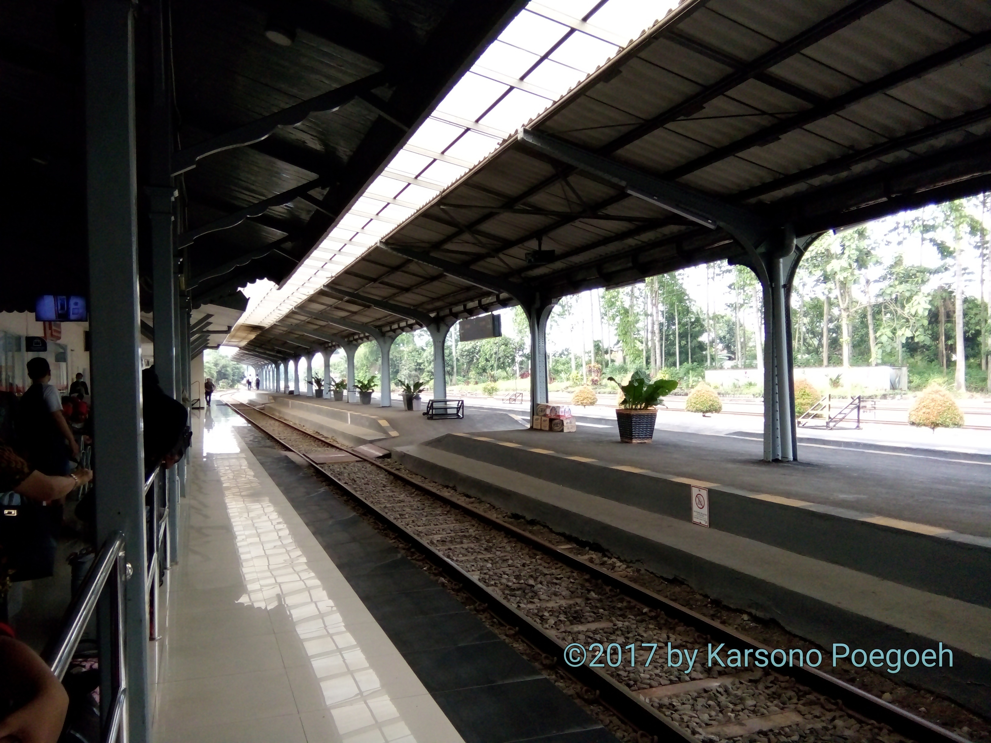 Peron Stasiun Jember arah barat (Sumber: karya sendiri)